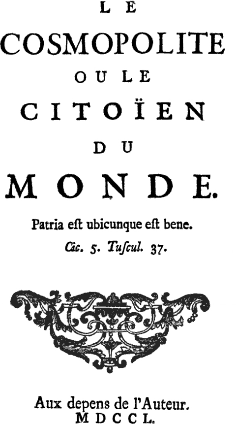 Title page of Le Cosmopolite ou le Citoïen du Monde, by Louis-Charles Fougeret de Monbron (1706-1761)